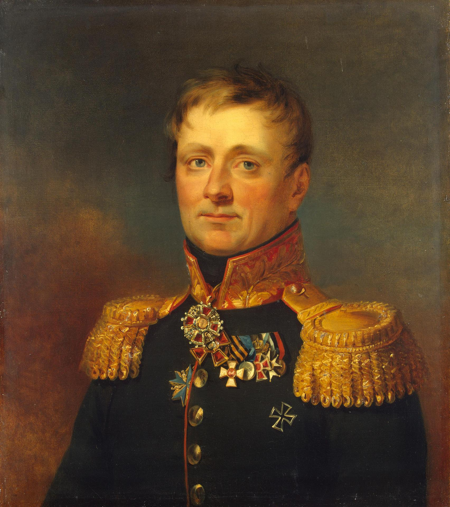 Karl Gustavovich Stal 1-st (30.08.1777 – 16.02.1853) russian general